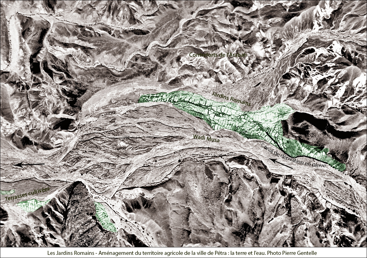 Vue aérienne des Jardins Romains, sur les bords du wadi Musa. Colorisé.